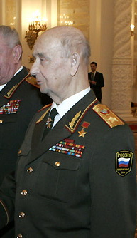 Sergei Leonidowitsch Sokolow